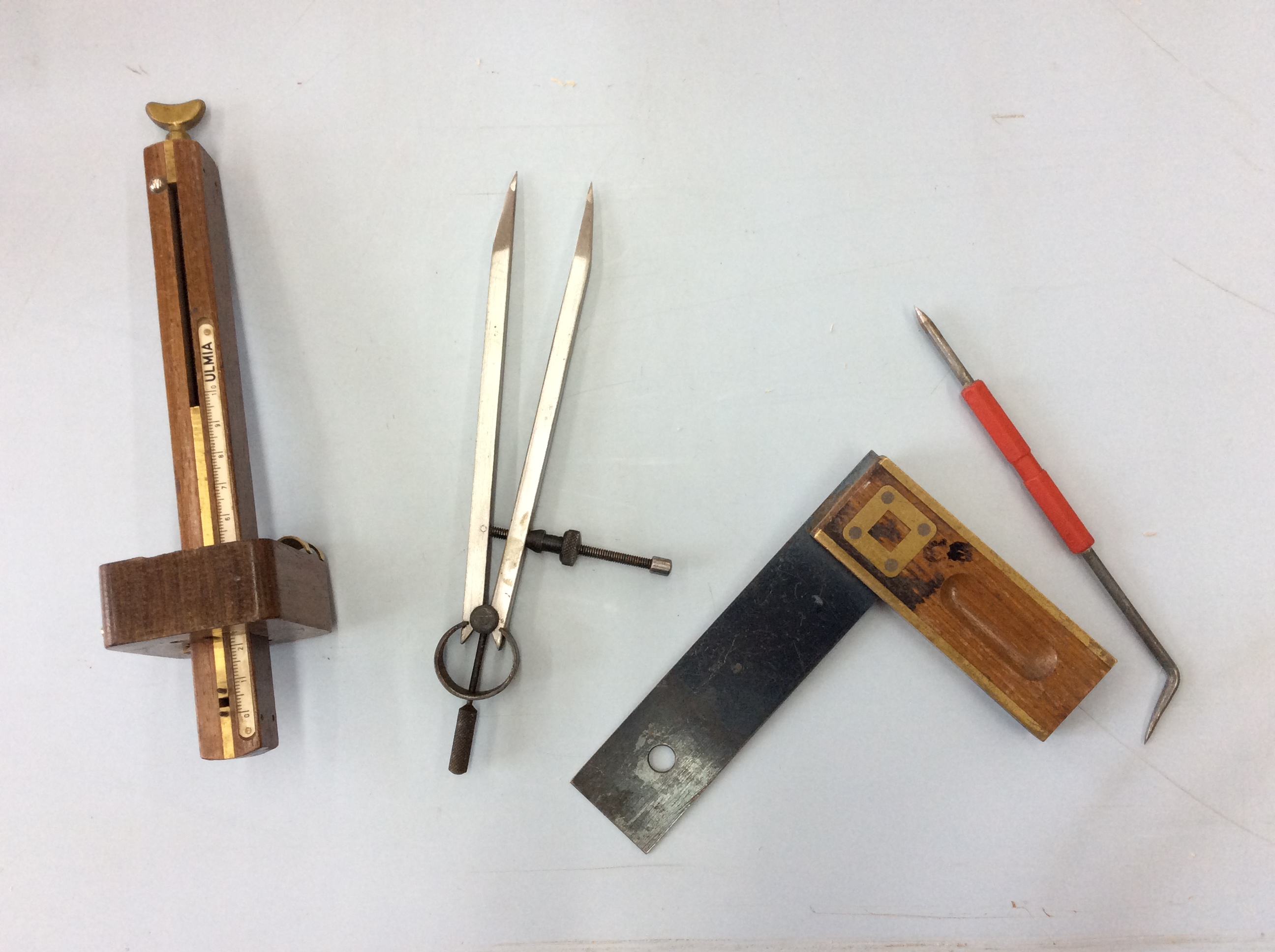 Trusquin, compas, équerre (pointes sèches)